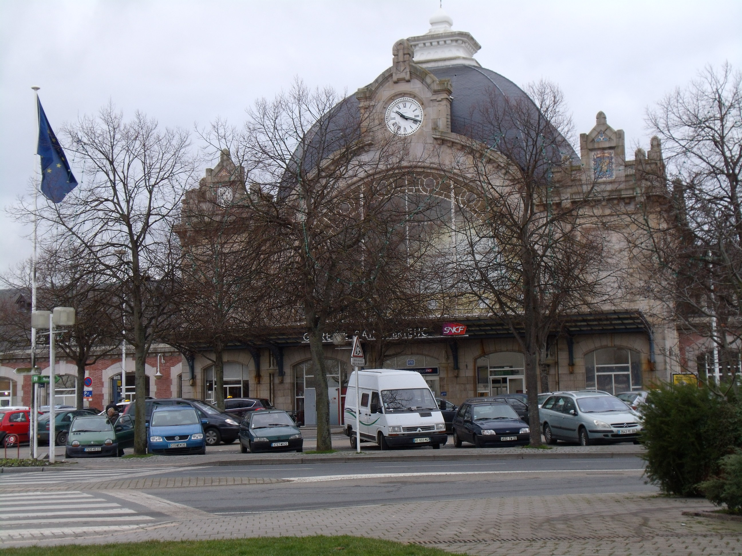 Gare de Saint-Brieuc en 2011, photo prise du square